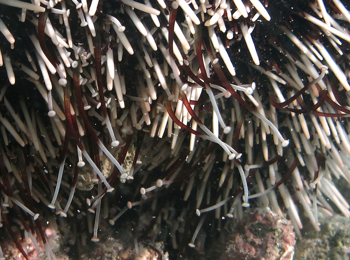 Podia d'un oursin Tripneustes gratilla à la Réunion.